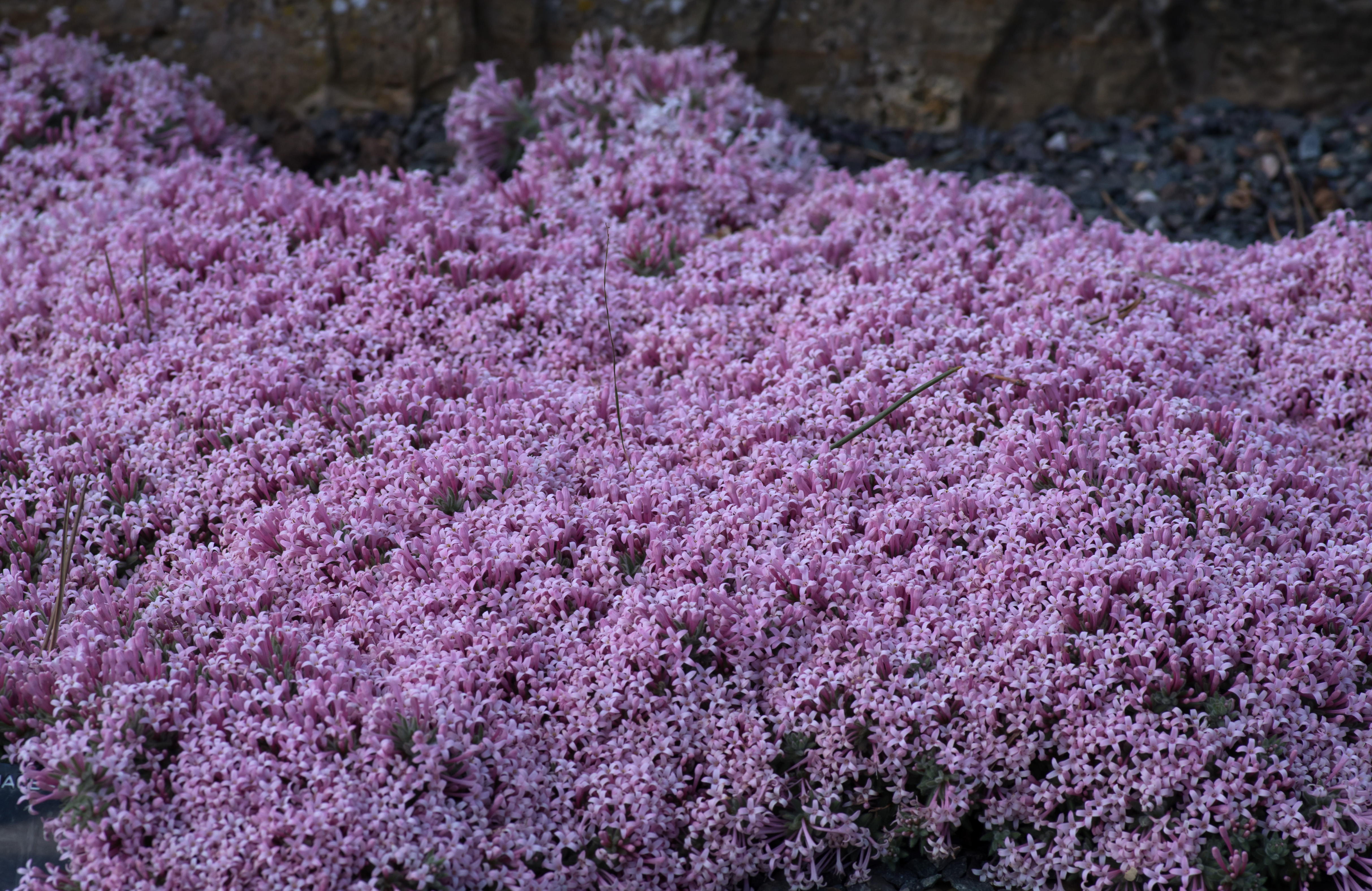 Asperula arcadiensis - Kew Gardens